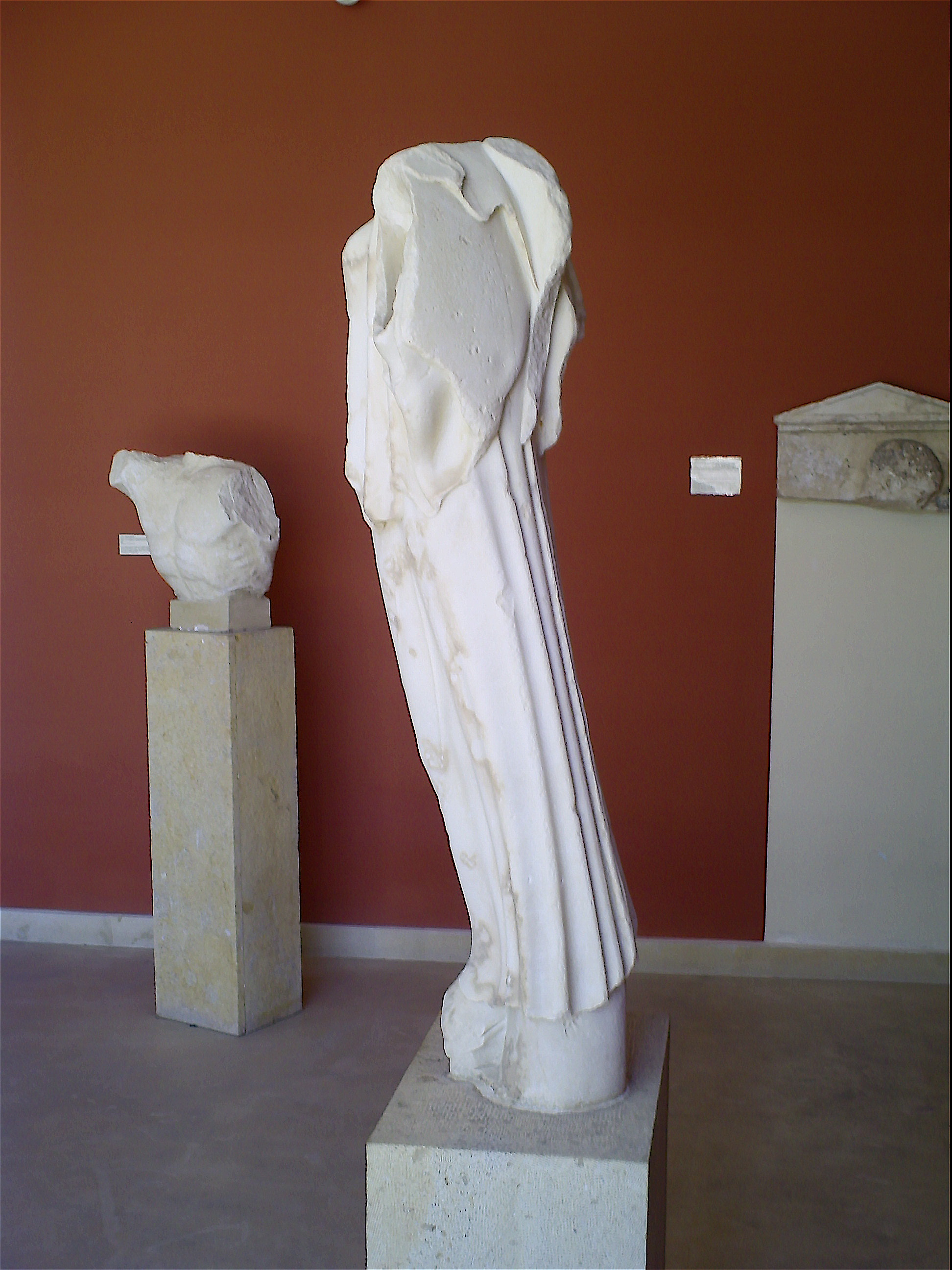 Statue de Niké (marbre de Paros). 480-470 avant J. C. Au fond, torse d'hoplite, marbre de Paros (480 avant J.C) et stèle funéraire (milieu du Ve siècle)